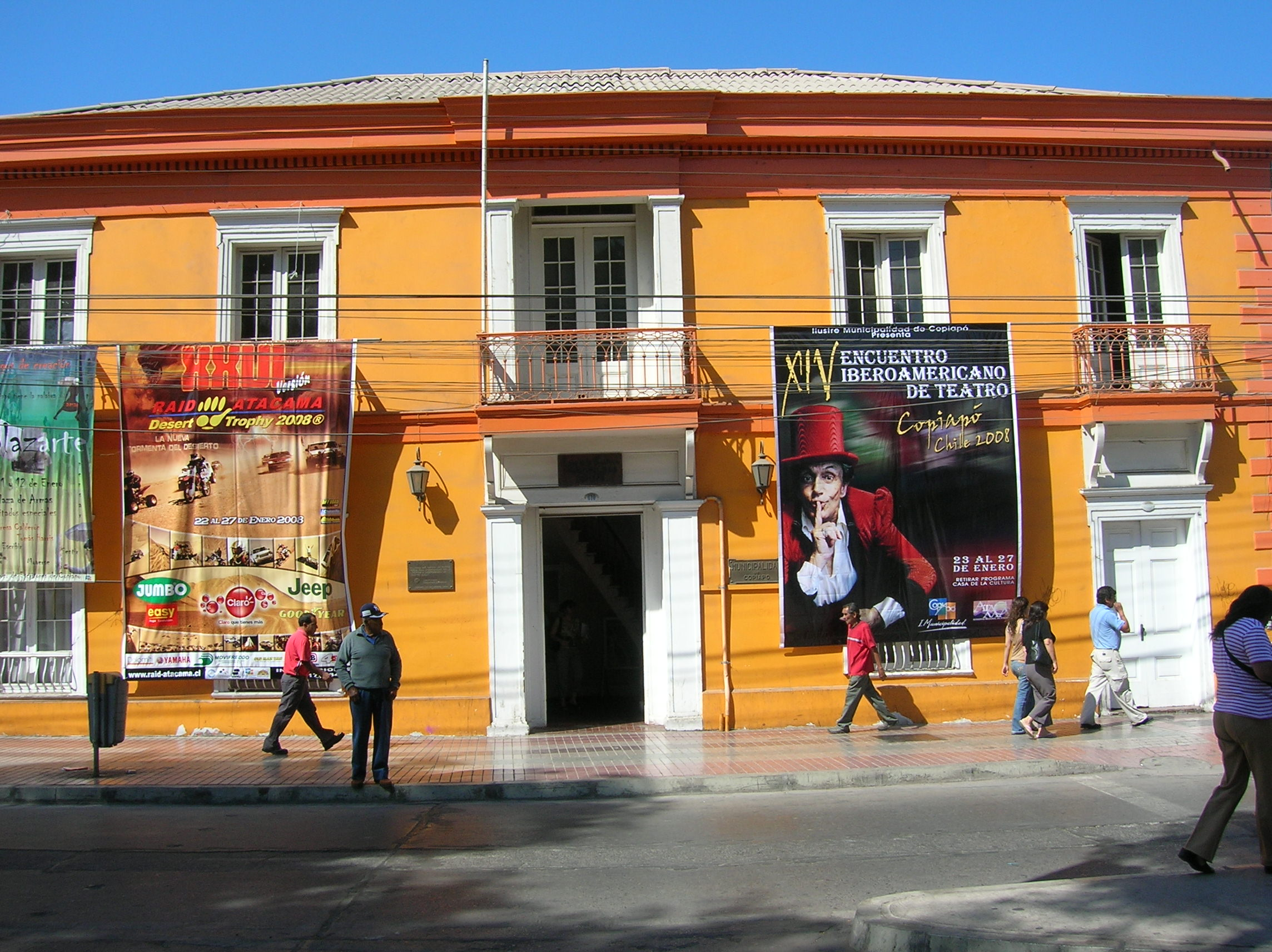 Casa de la cultura de copiapó